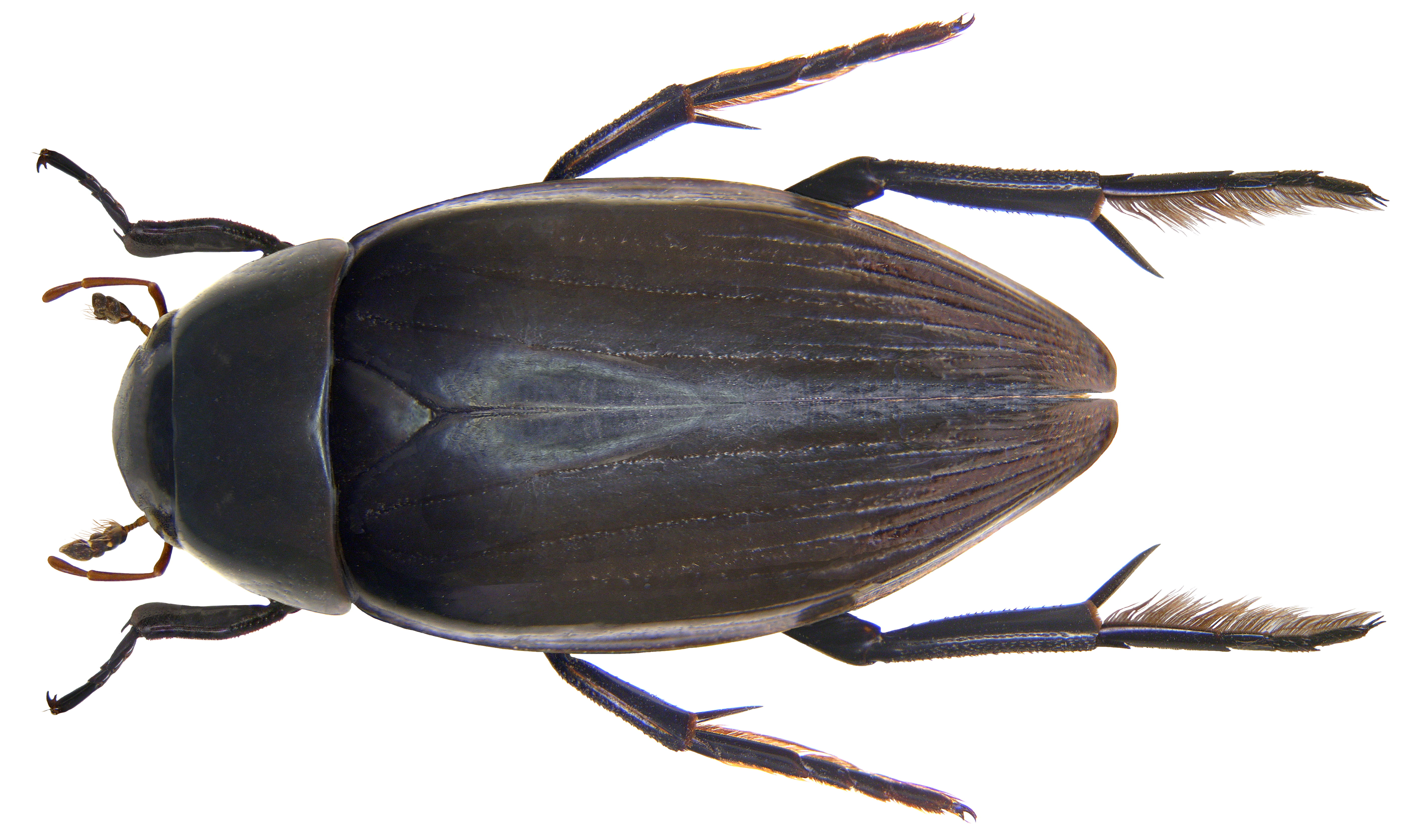 Familie: Hydrophilidae Groesse: 38 mm Verbreitung: Europa Ökologie: in vegetationsreichen Tümpeln, Pflanzenfresser leg. det. Pytlinski, 1991 Photo: U.Schmidt, 2009